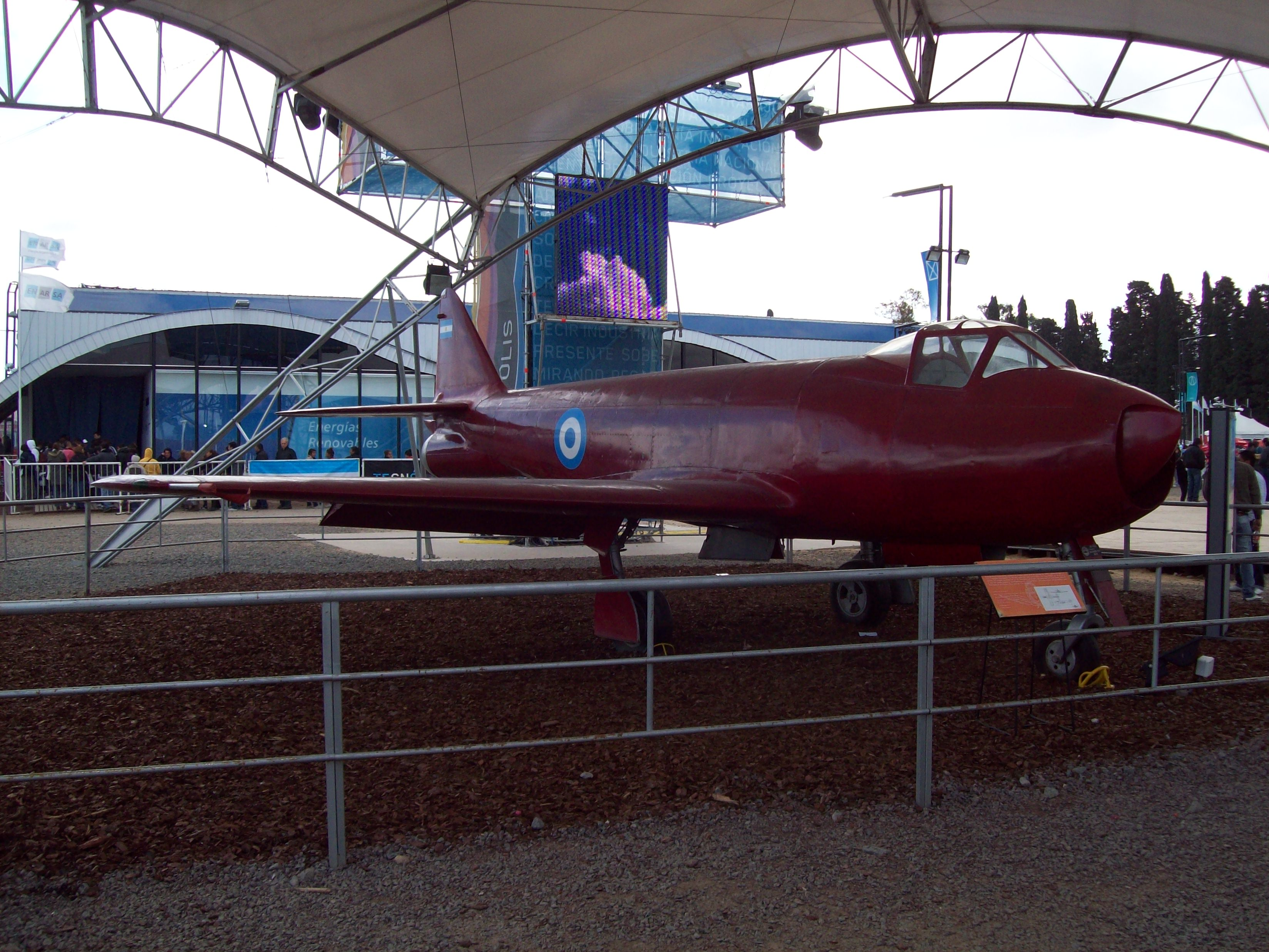 Avión I.Ae. 27 Pulqui I en Tecnópolis.